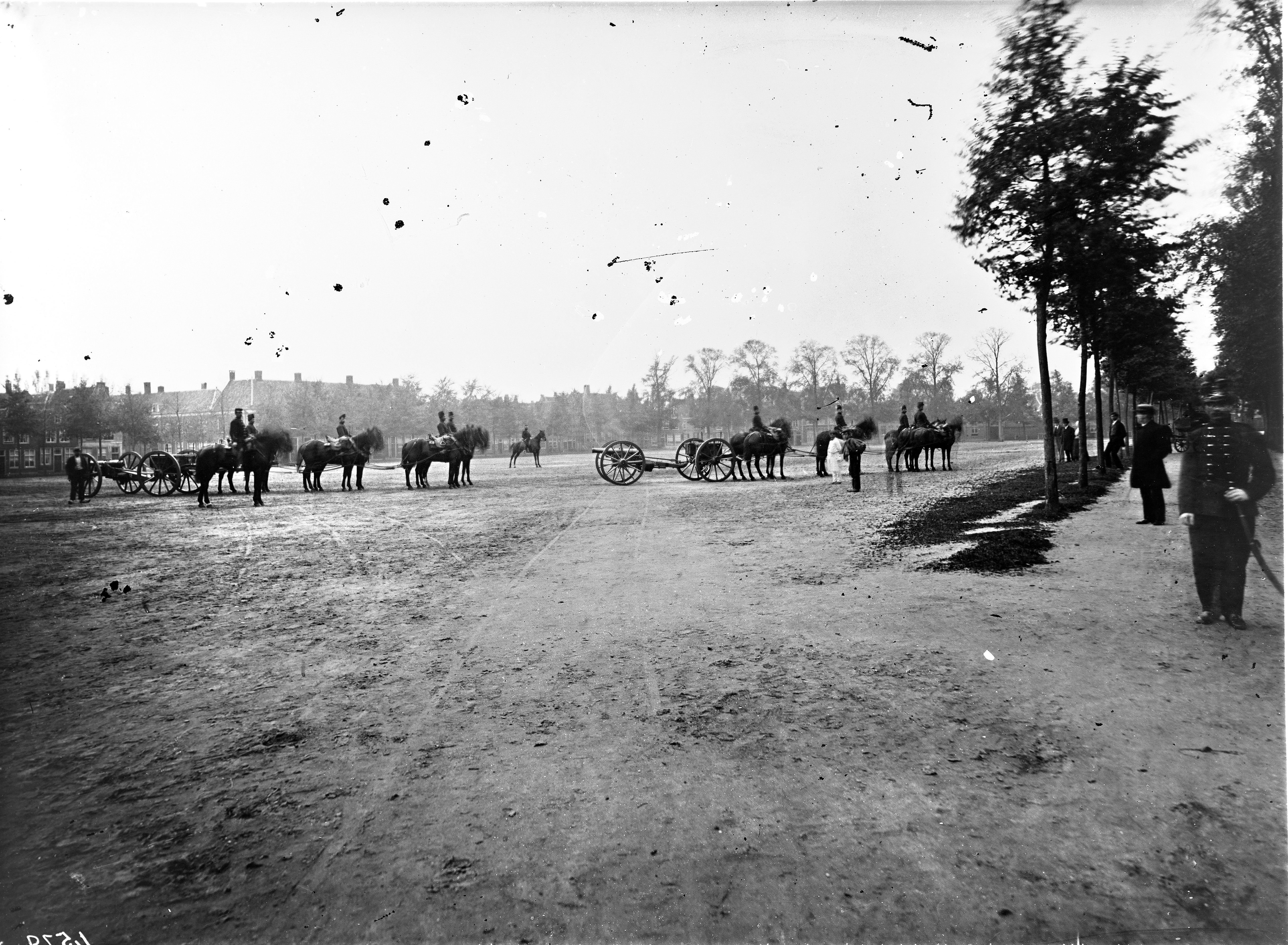 Gezicht op de Grote Ruïne na de ramp, vanaf de Garenmarkt naar de Doezastraat gezien. Op de voorgrond geschutsexercitie van de artillerie. Links op de achtergrond de Jacobsgracht en huizen aan de Raamsteeg.